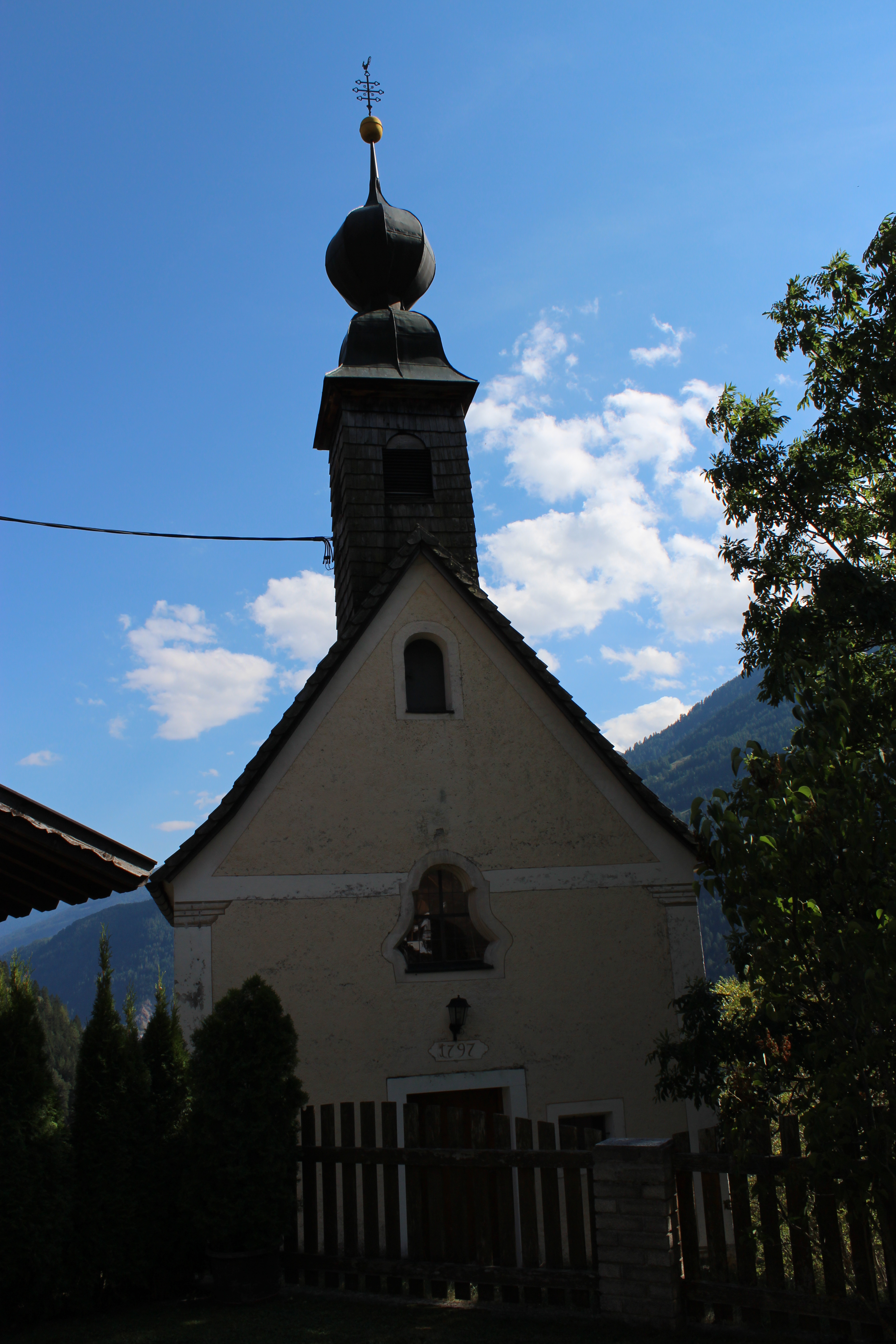 Kapelle Maria Heimsuchung